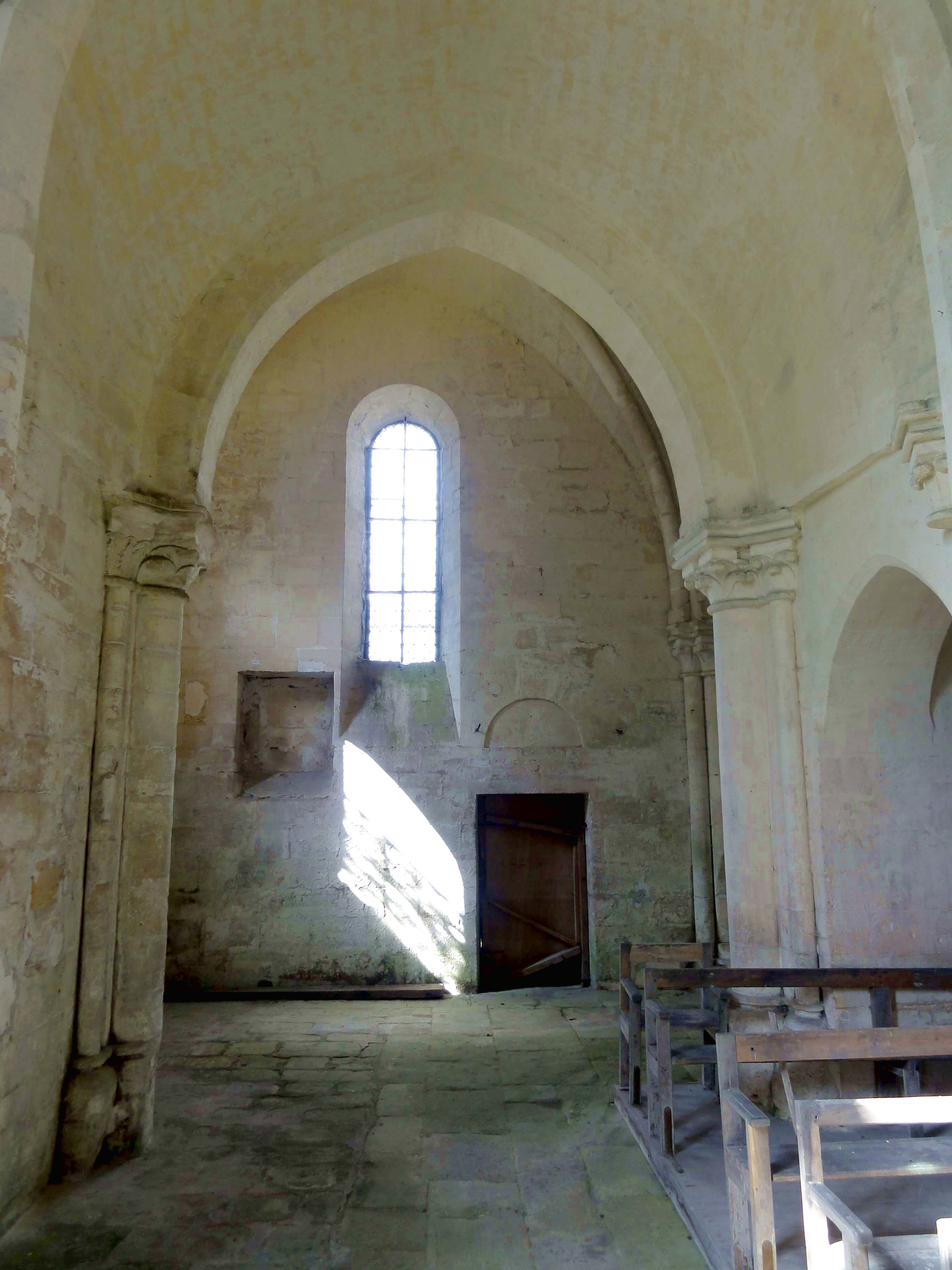 Intérieur de l'église - voir titre.